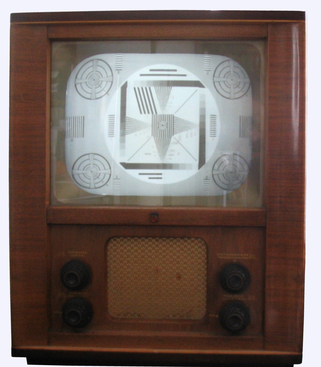 Schwarzweiß-Testbild der 1950er und 1960er Jahre auf Philips-Fernseher TD1410U ("Starenkasten") von 1952